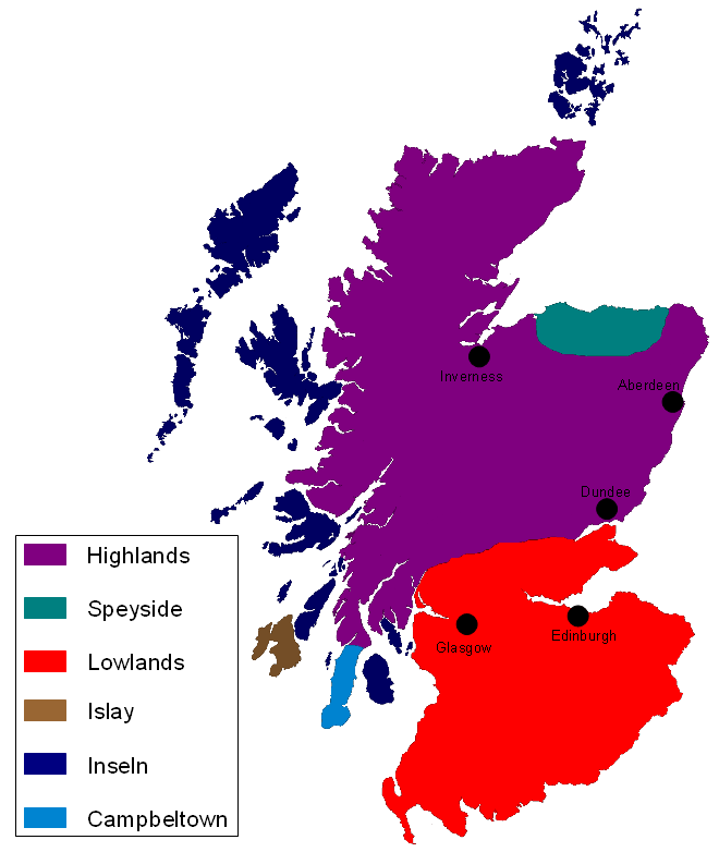 Karte der Whiskyregionen Schottlands